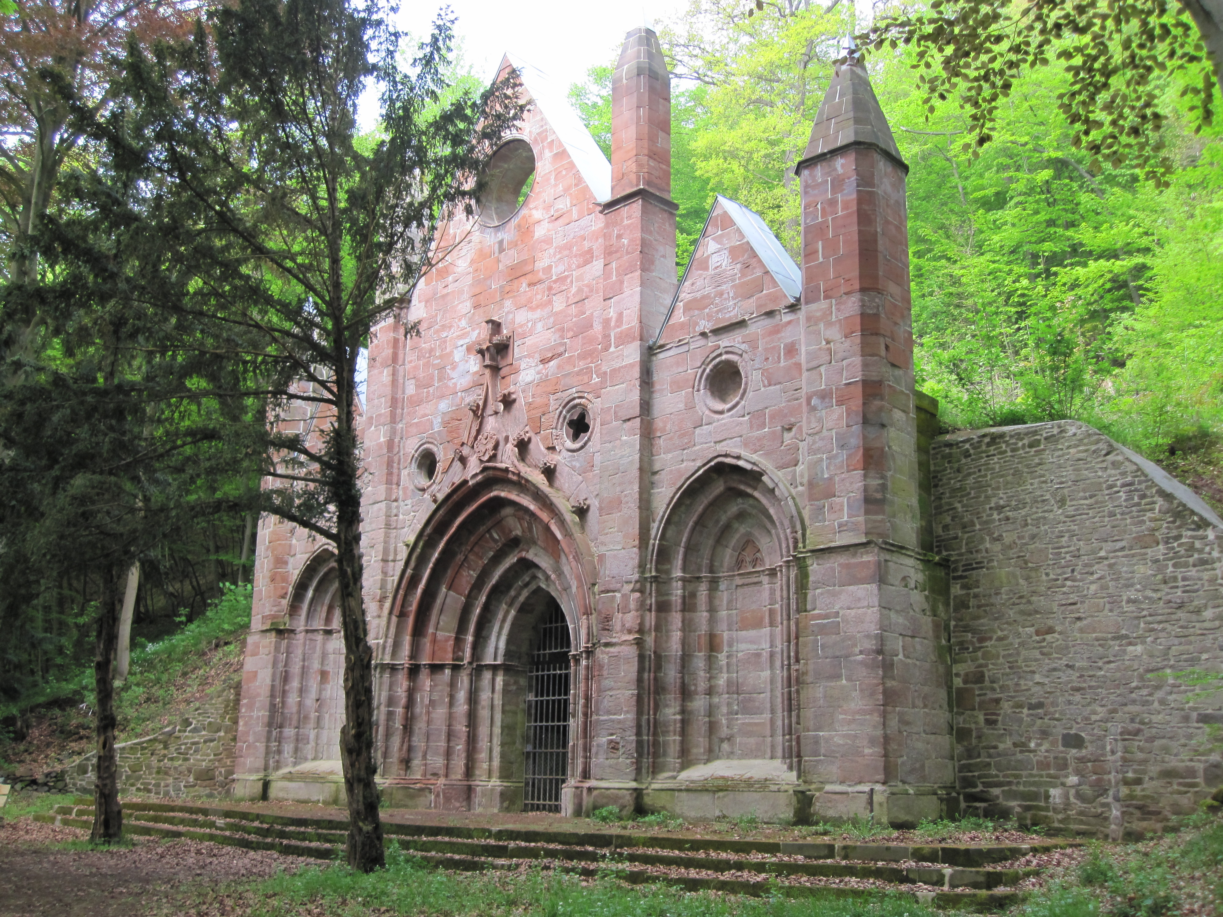 erbaut 1834